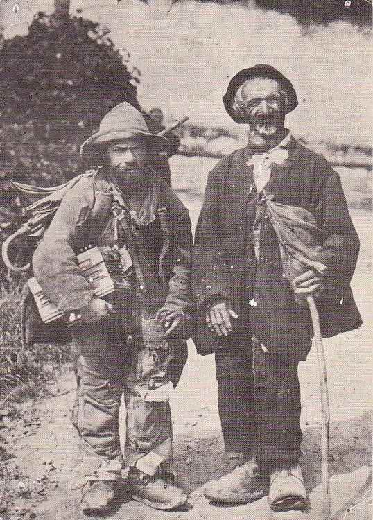 Verarmte Jenische im 19. Jahrhundert (Muotathal, Schweiz)